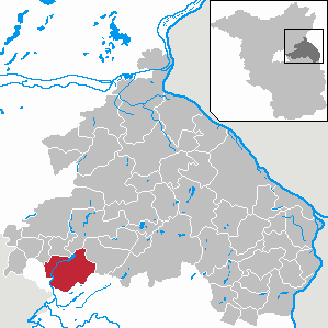 Rüdersdorf bei Berlin in Brandenburg (Country) - District Märkisch-Oderland